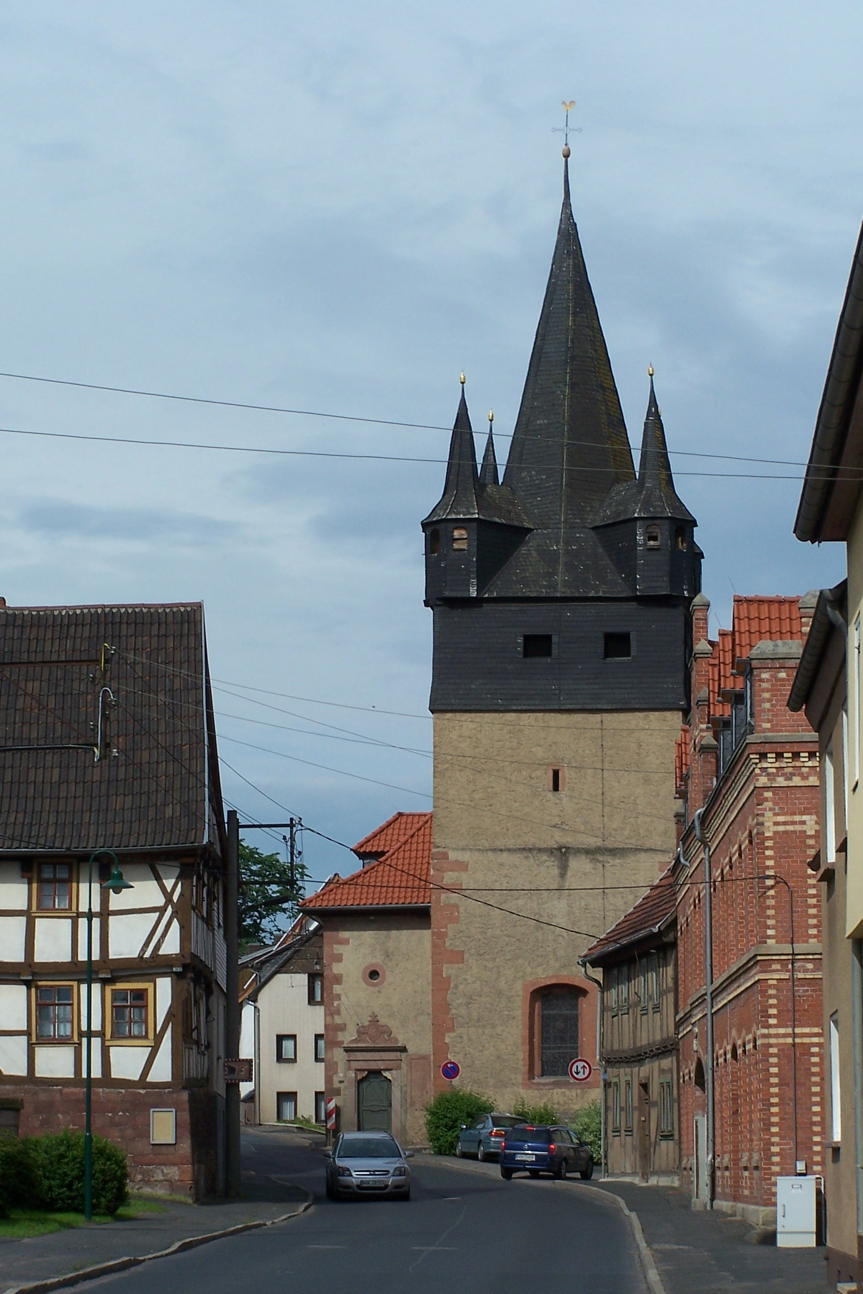 Gesamtansicht der Kirche von Westen.